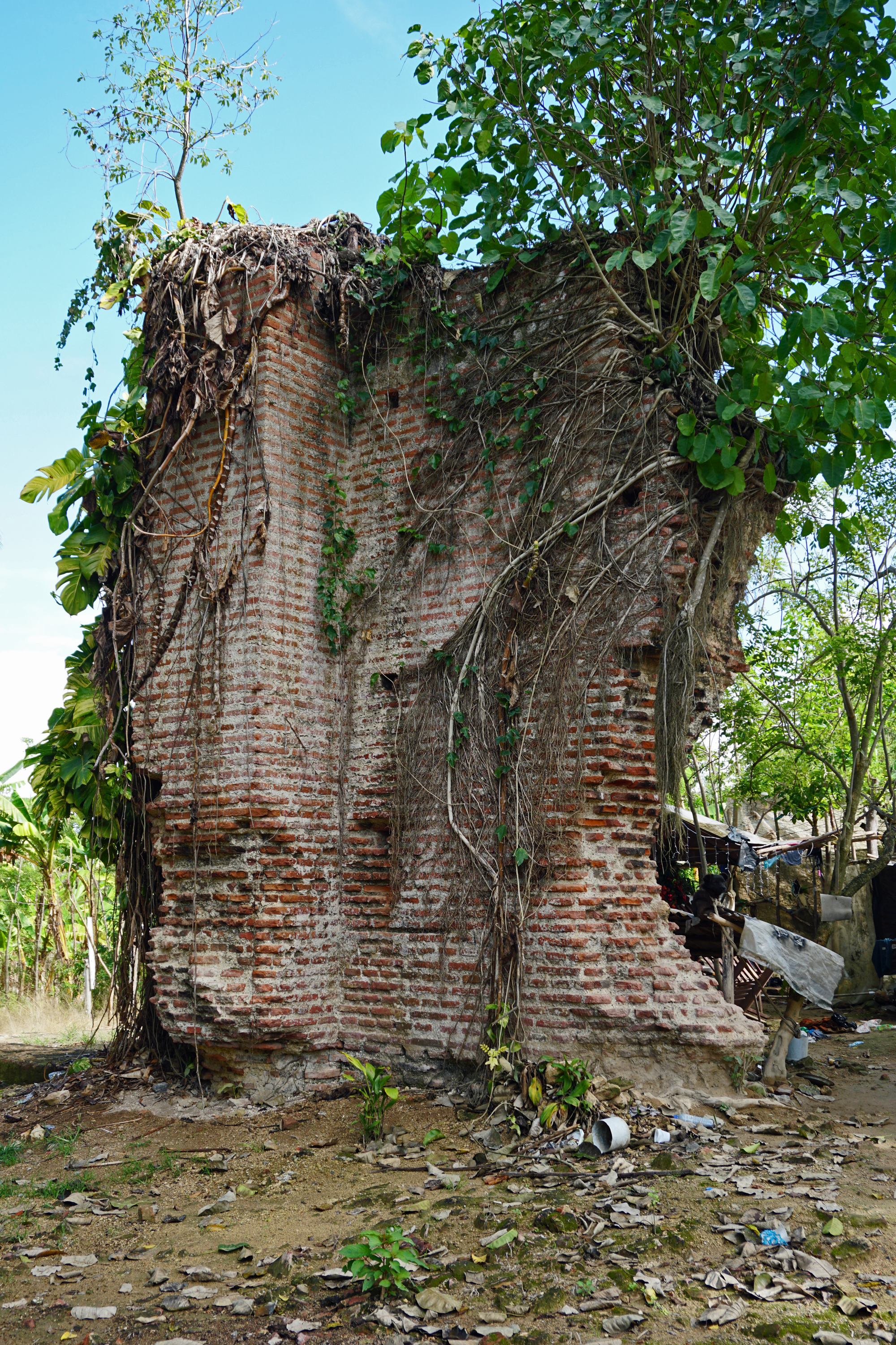 Ruinas de una pared exterior y contrafuerte de la catedral de la Concepción de la Vega (La Vega Vieja). Esta es el único resto de las ruinas de la catedral todavía en pie.